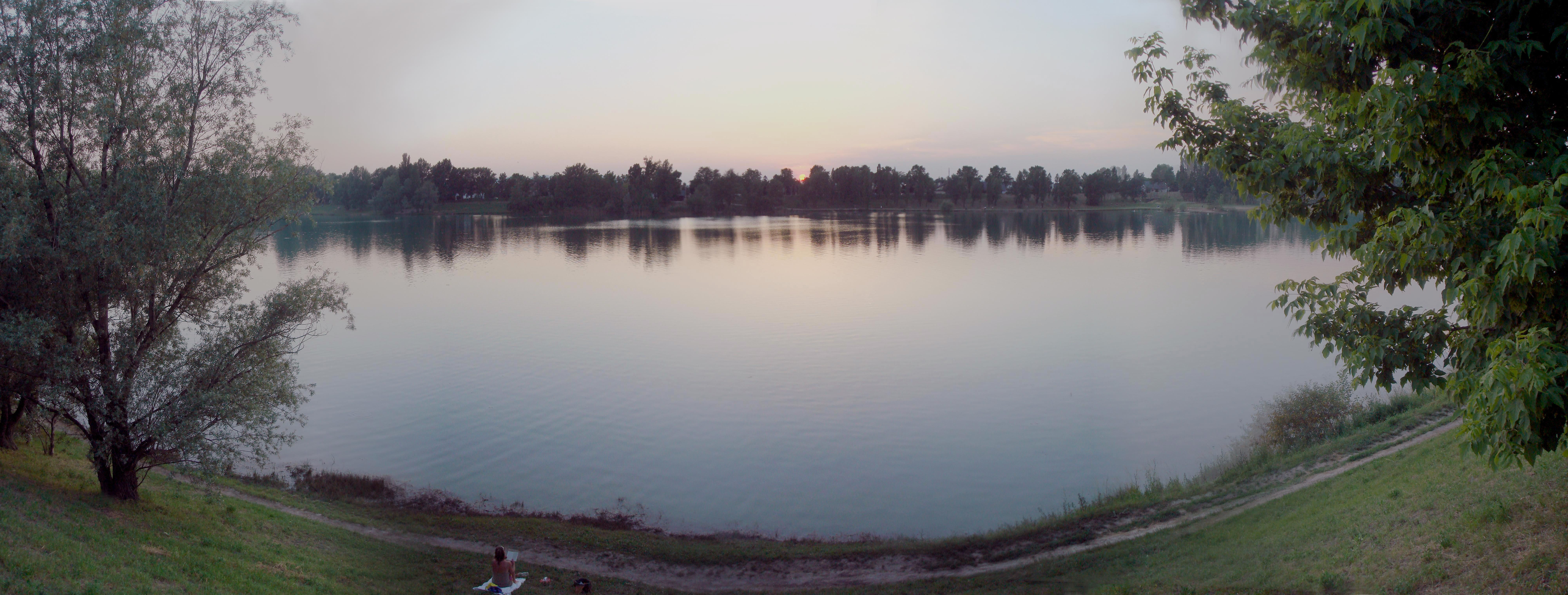 Location in Vienna Austria Ziegelhofteich or Hirschstettner Badeteich Panorama Photograph by: Robert Paprstein Date: 18.06.2006